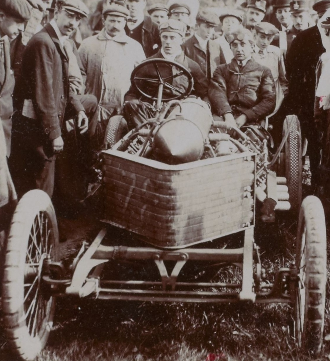 [Collection Jules Beau. Photographie sportive] : T. 32. Année 1906 / Jules Beau : F. 48. Course de côte de Gaillon, organisée par l' Auto, 28 octobre [1906]